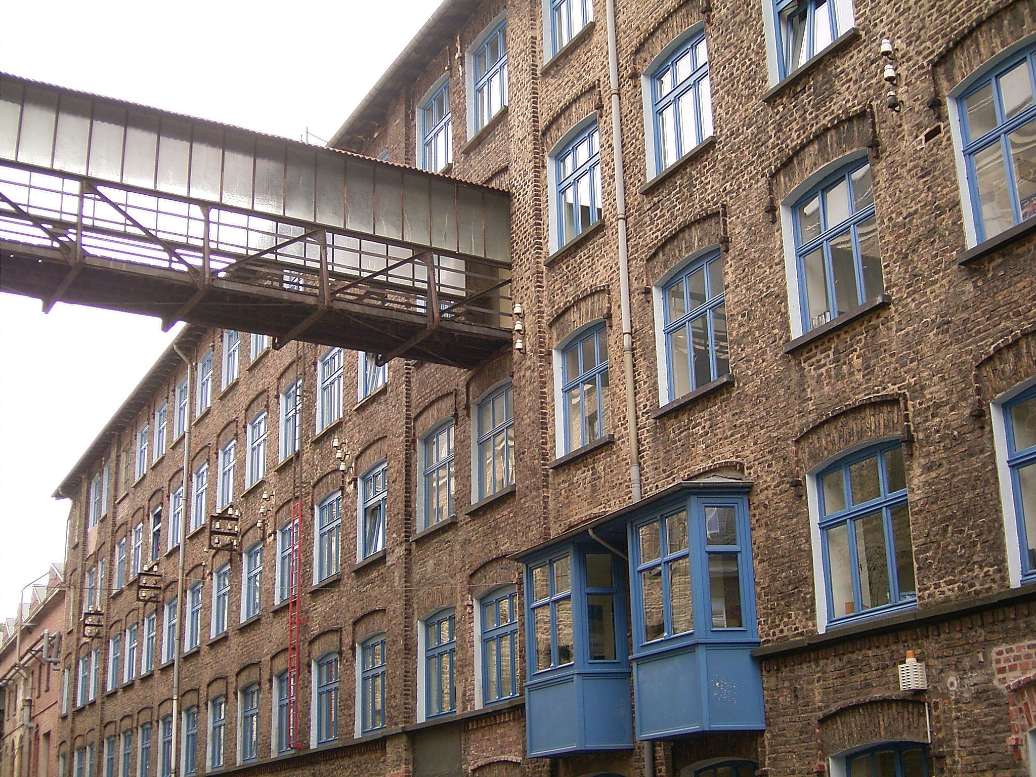 Radevormwald